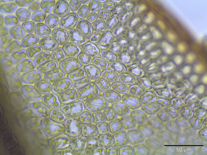 Pfriemen-Drehzahnmoos (Tortula subulata), Laminazellen, Vergrößerung: 400x